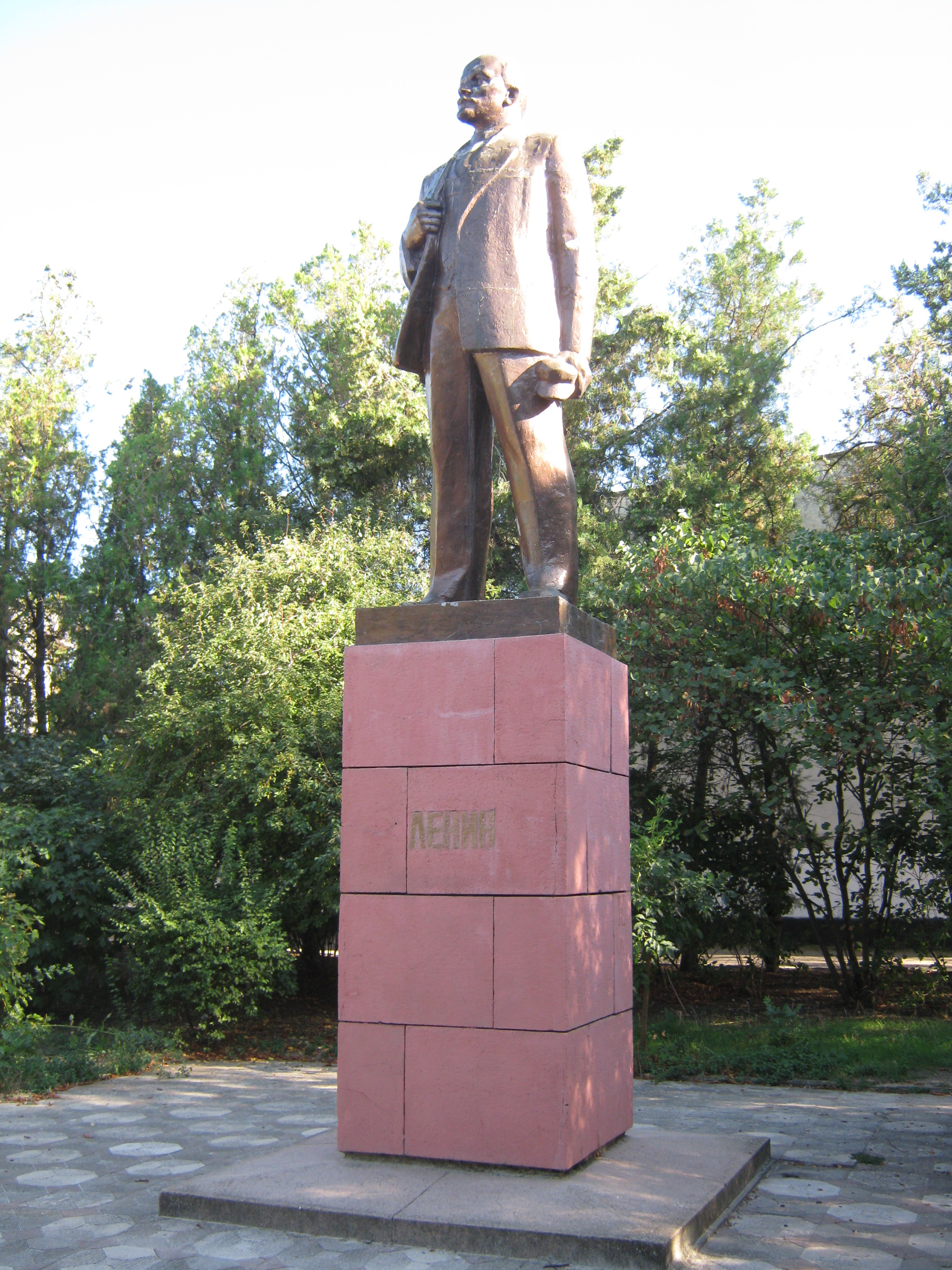 Памятник Ленину в Николаевке (Крым) 3